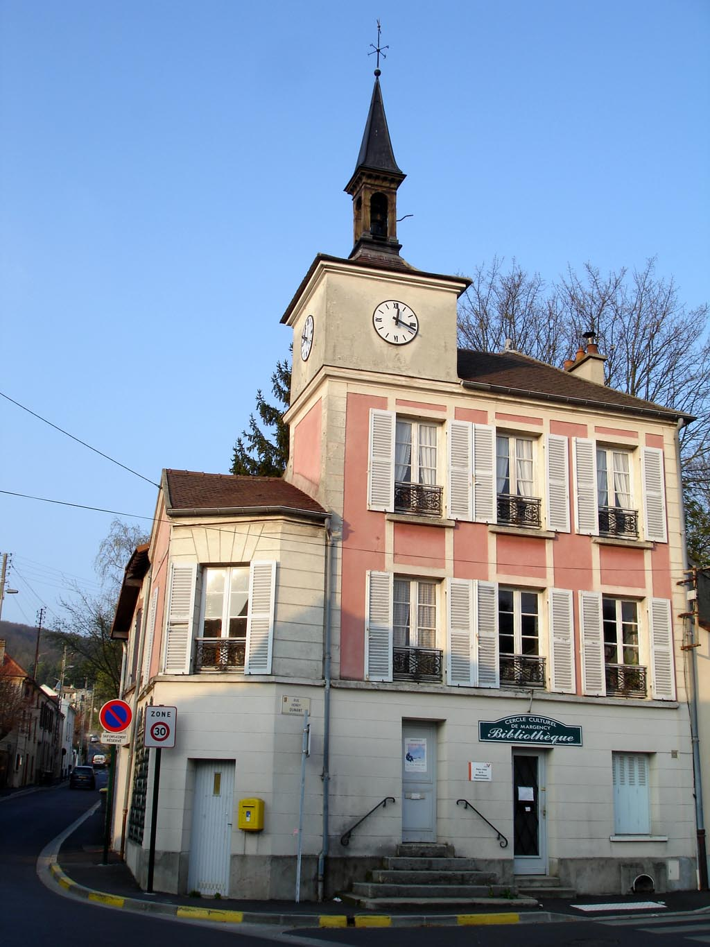 Ancienne mairie (actuelle bibliothèque) de Margency - Val-d'Oise (France)